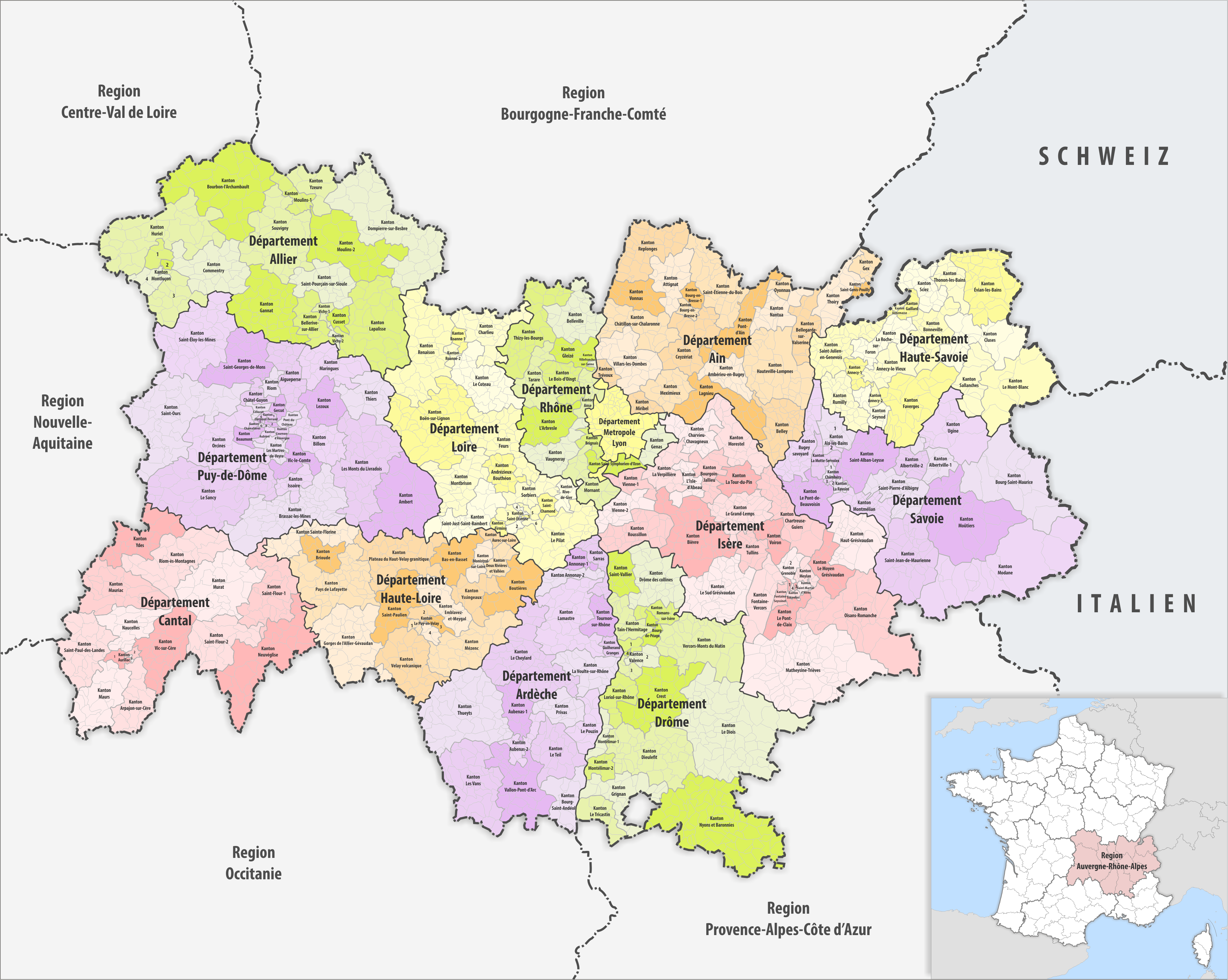 Gemeinden, Kantone und Departemente in der Region Auvergne-Rhône-Alpes